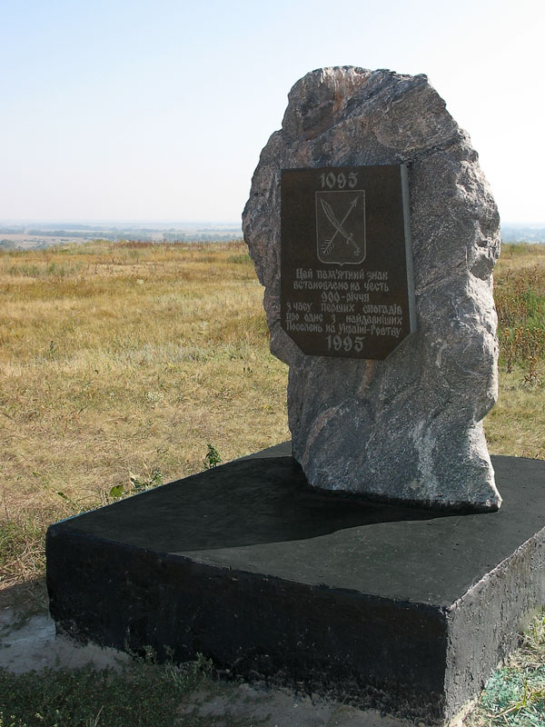 Пам'ятний знак, встановлений до 900-річчя першой літописної згадки про поселення Говтва.